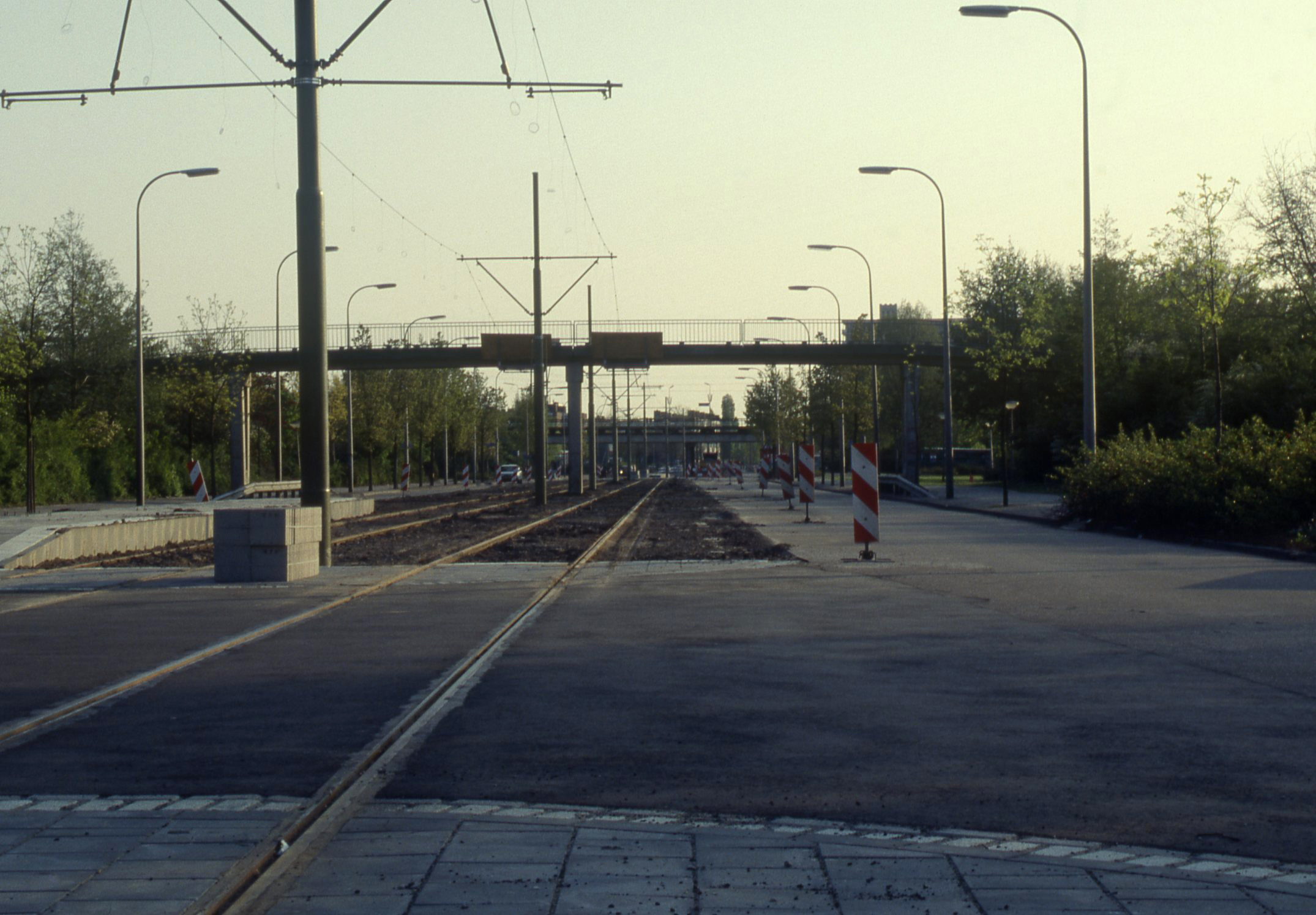 De aanleg van een trambaan op de Monseigneur van Steelaan in Leidschendam-Voorburg voor de toenmalige tramlijn 7 en later tramlijn 2.